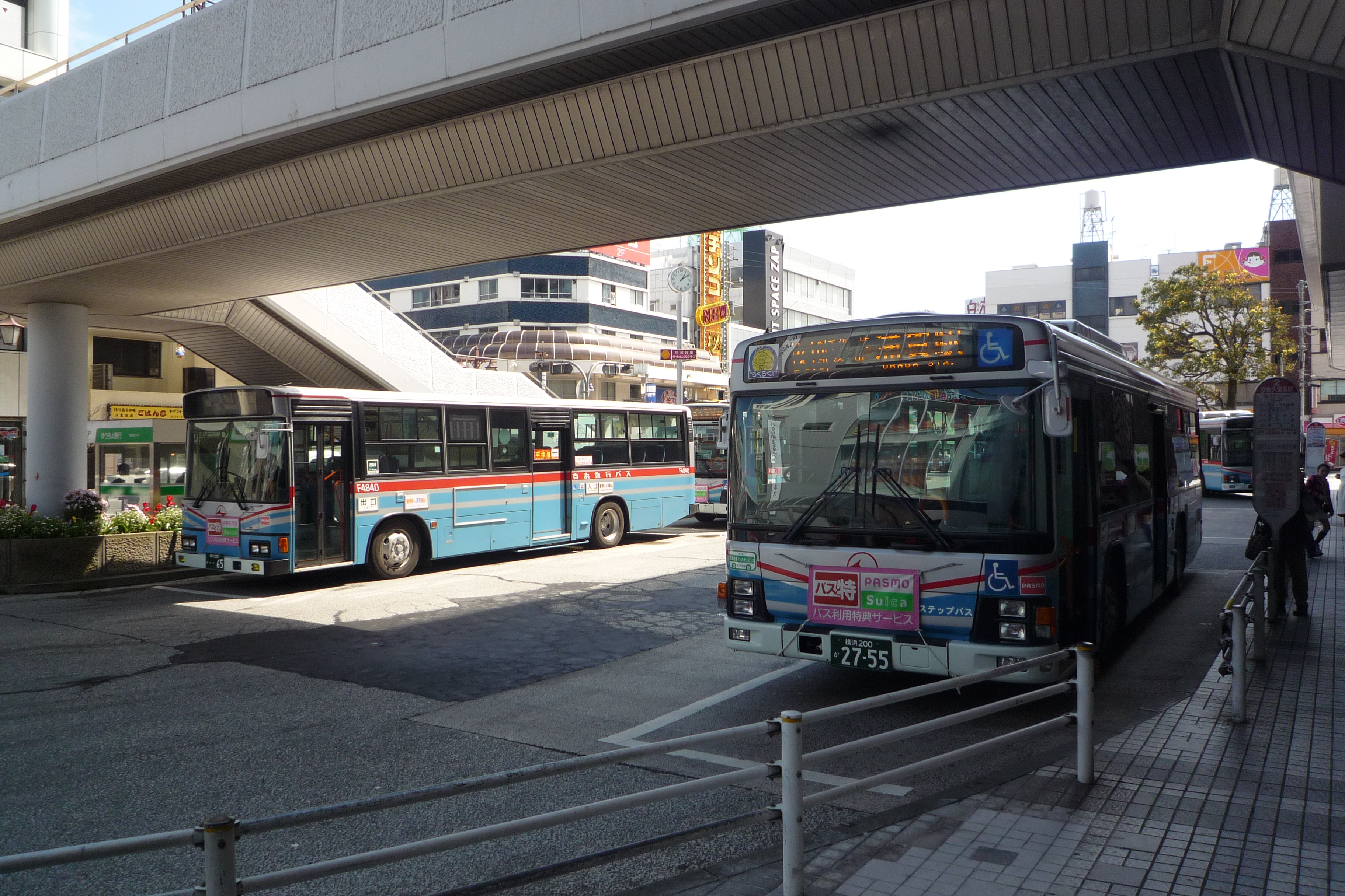 京急久里浜駅バスターミナル